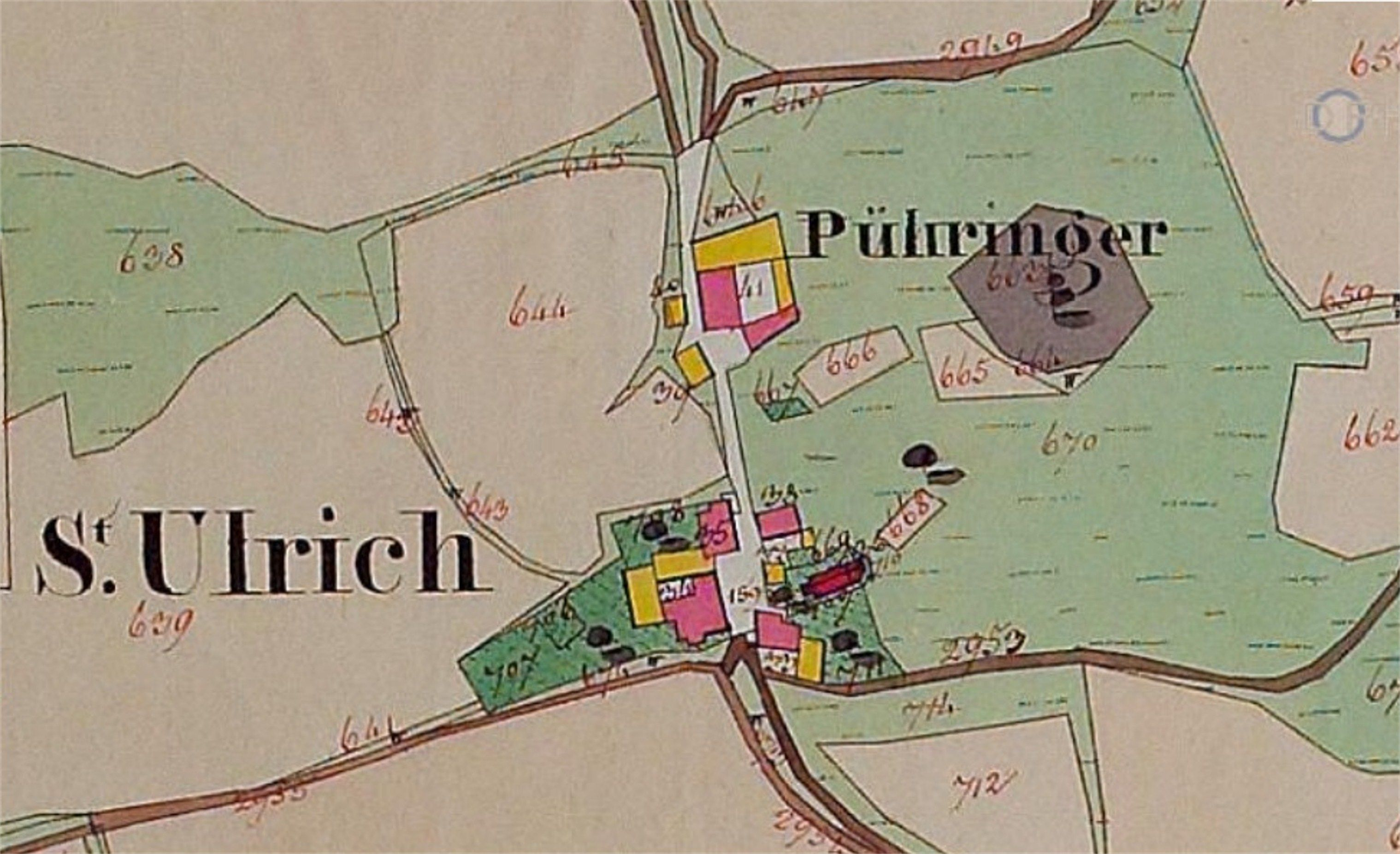 Urmappe St. Ulrich im Mühlviertel